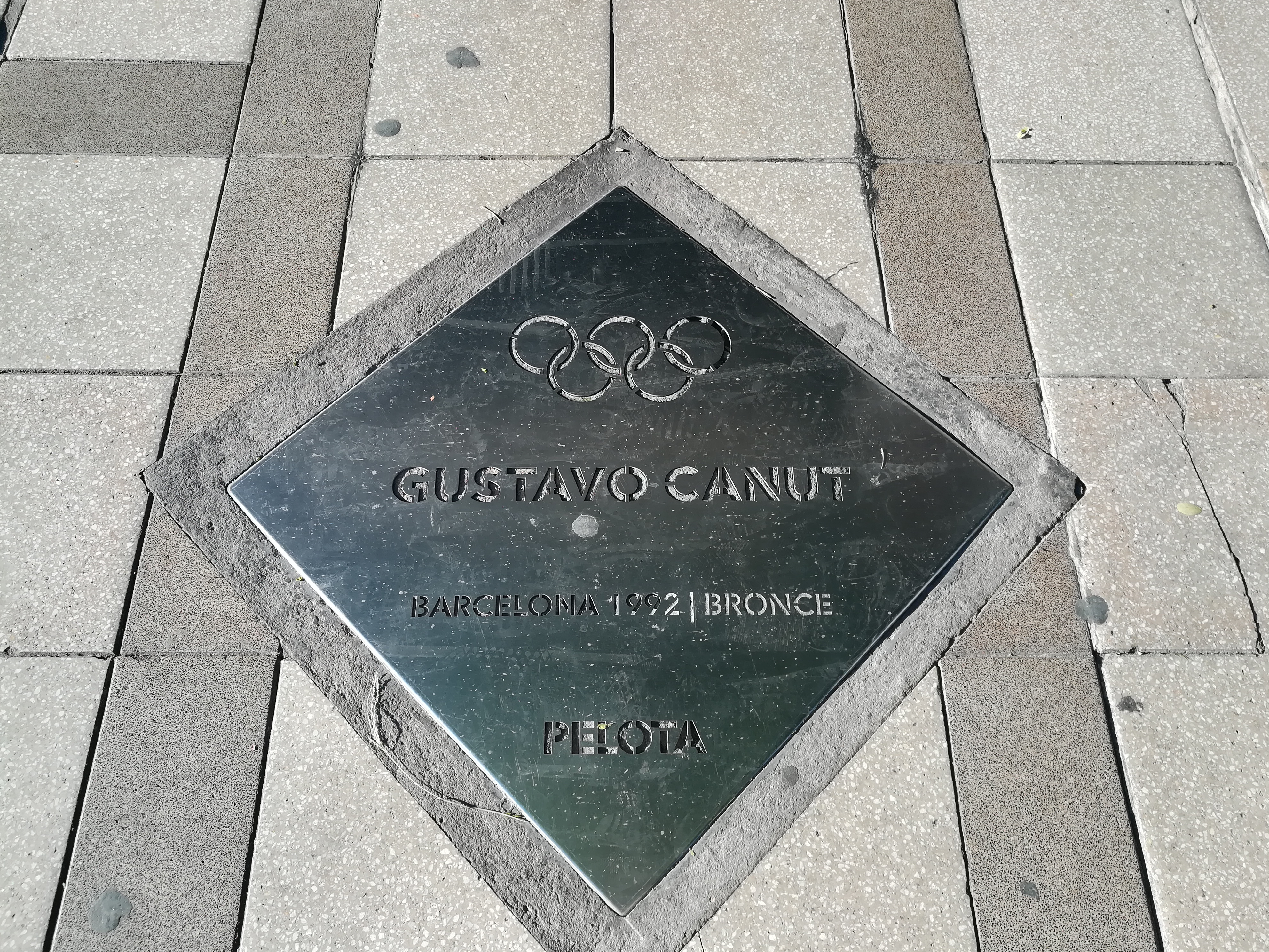 Paseo de los Olímpicos de los en la Avenida Pellegrini (Rosario).